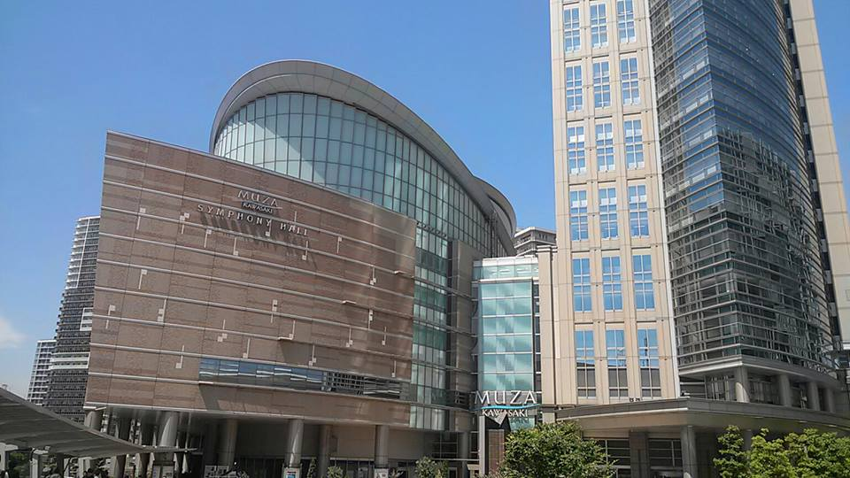 ミューザ川崎、5月撮影。